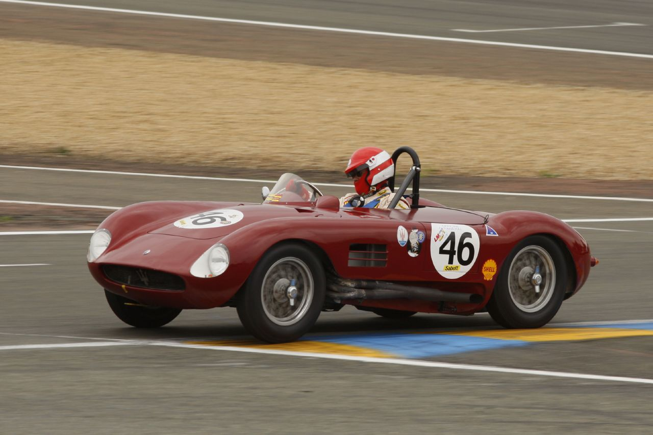 Maserati 150 S de Giuseppe TOMASETTI